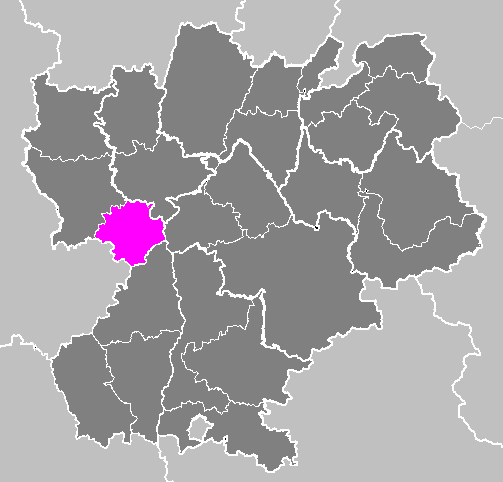 Maps of arrondissements and cantons of France: Arrondissement de Saint-Étienne.PNG (Région Rhône-Alpes)